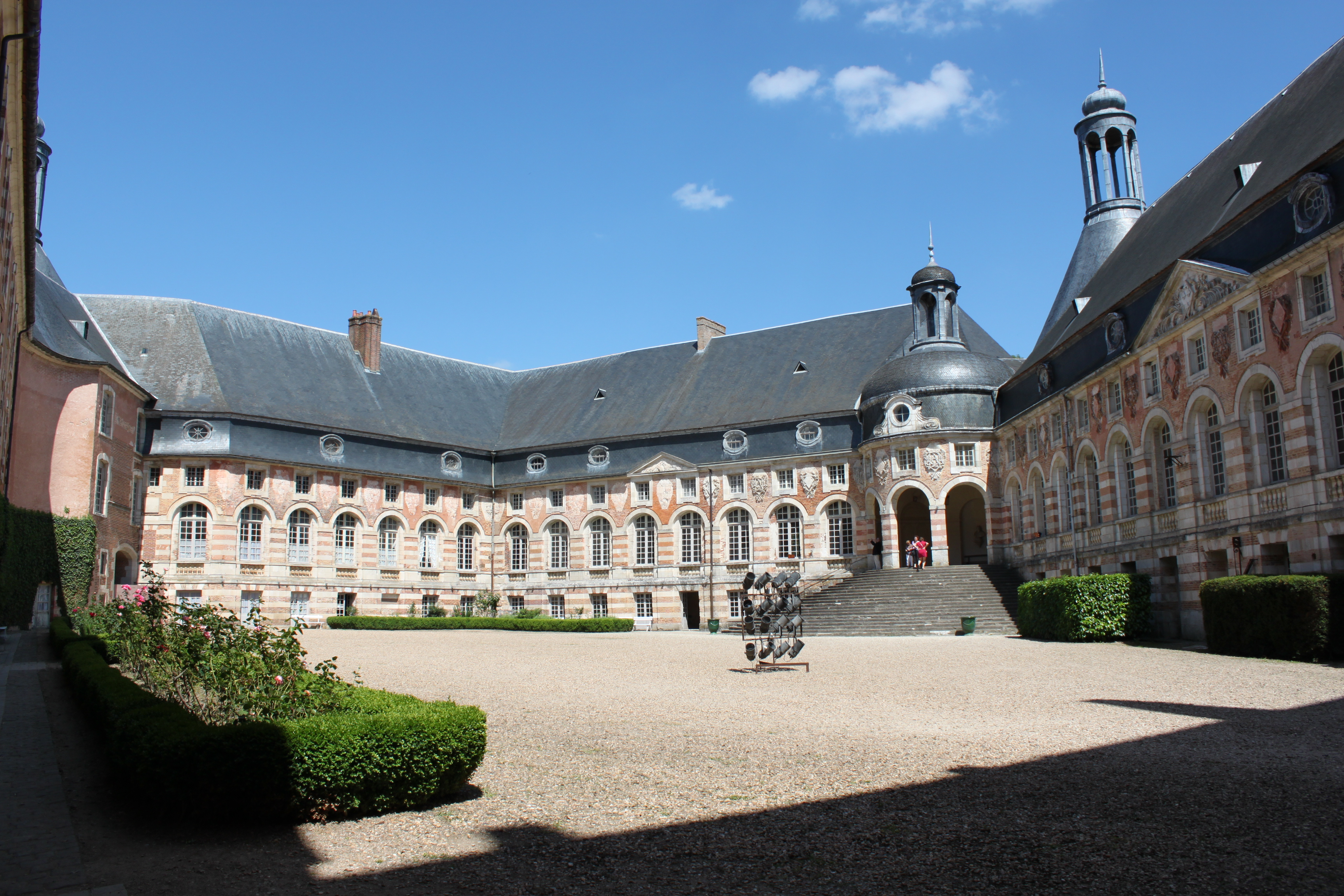 Château de Saint-Fargeau, Saint-Fargeau, Yonne, Bourgogne, France